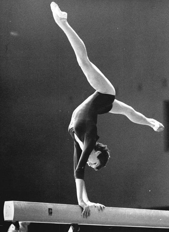 Marianne Noack Zentralbild Wendorf-7.12.69 Berlin: DDR-Turnmeisterschaften der Frauen im olympischen Achtkampf in der Dynamo-Sporthalle - Marianne Noack (SC Empor Rostock) bei ihrer Pflichtkür am Schwebebalken.